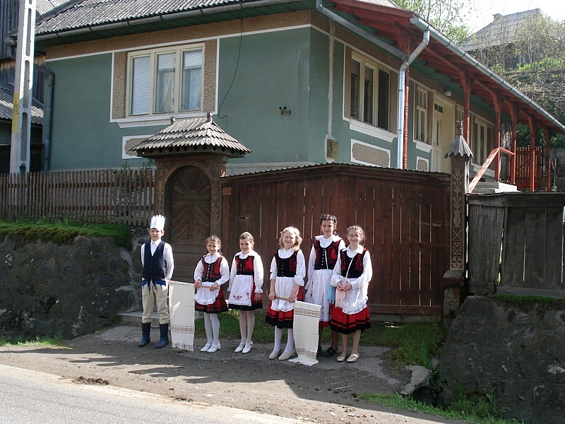 Hesspávázók Felsősófalván, 2008 (Erdély, Székelyföld)